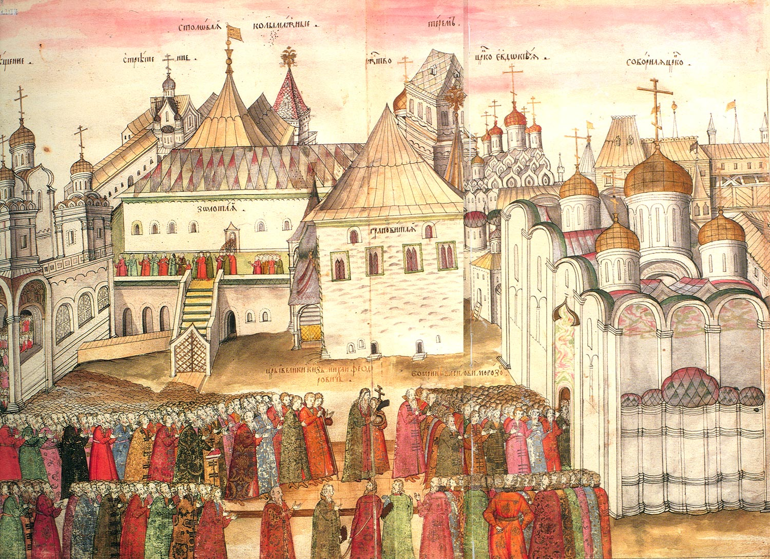 Соборная площадь Московского Кремля. Слева, в подклете, - Казенный двор. Миниатюра из книги "Об избрании на... престол". 1672-1673 // Государственная Оружейная палата. - М., 1988. - С. 8-9.